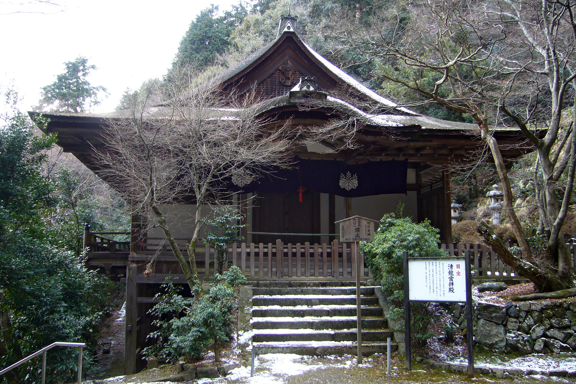 Kami-Daigo in Kyoto, Japan